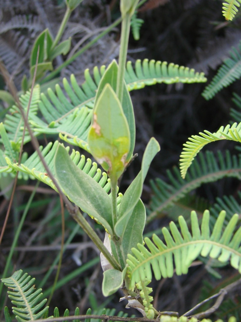 Calolisianthus pedunculatus - GENTIANACEAE - Parque Estadual do Biribiri - Serra do Espinhaço - Diamantina - Minas Gerais - Brasil.